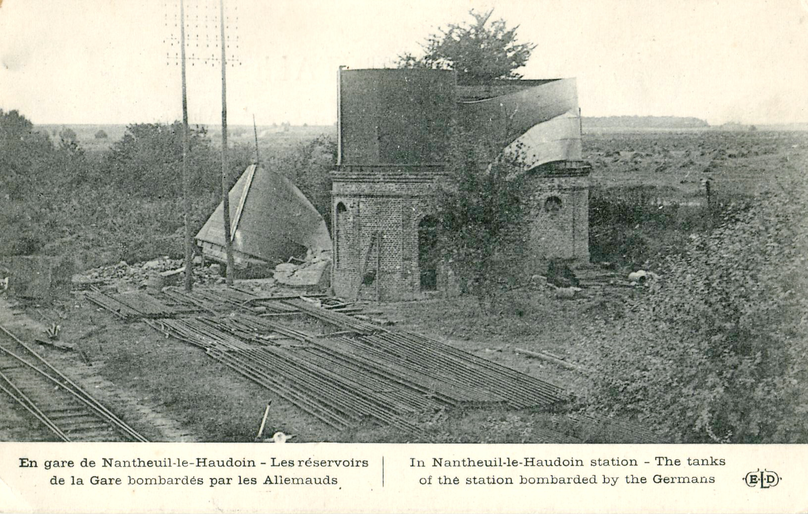 Carte postale ancienne éditée par ELD : En gare de Nantheuil-le-Haudoin - Les réservoirs de la gare bombardés par les Allemands